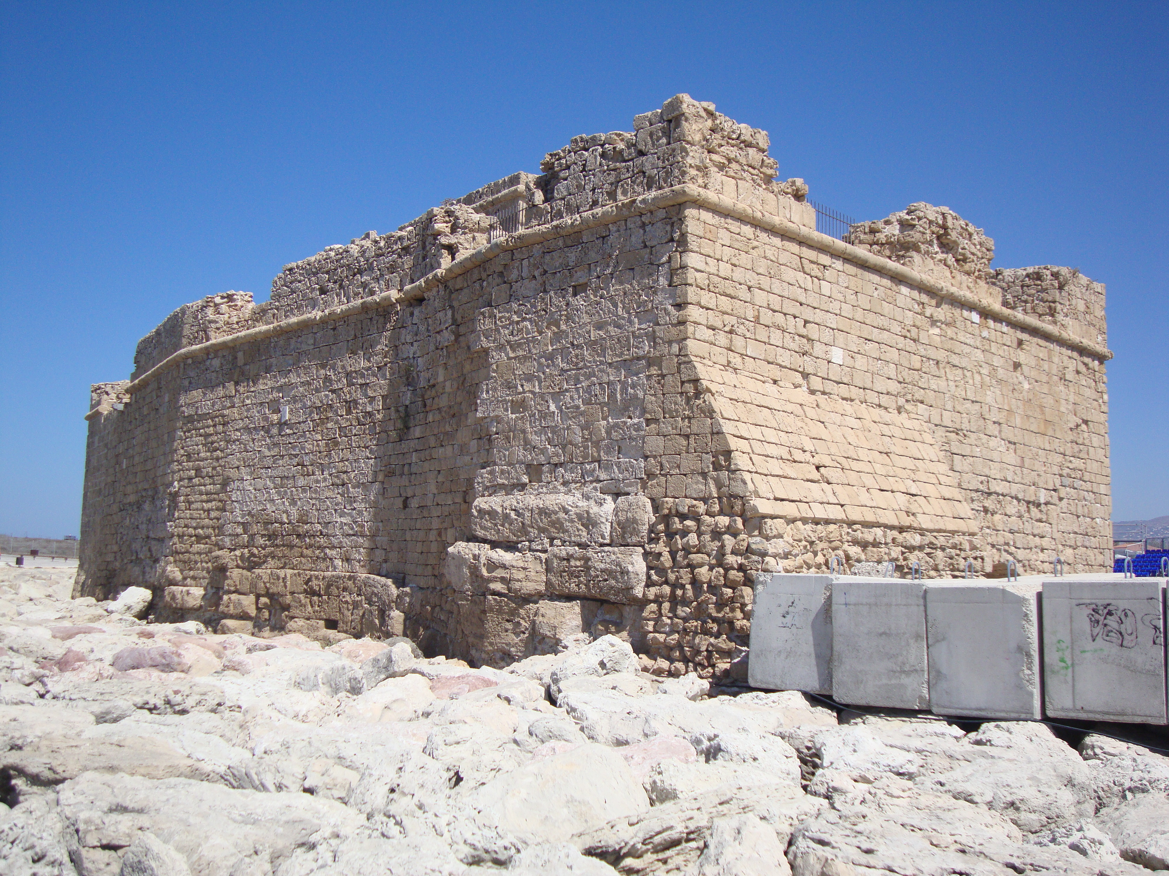 Пафосский замок, вид с моря. 09.2013